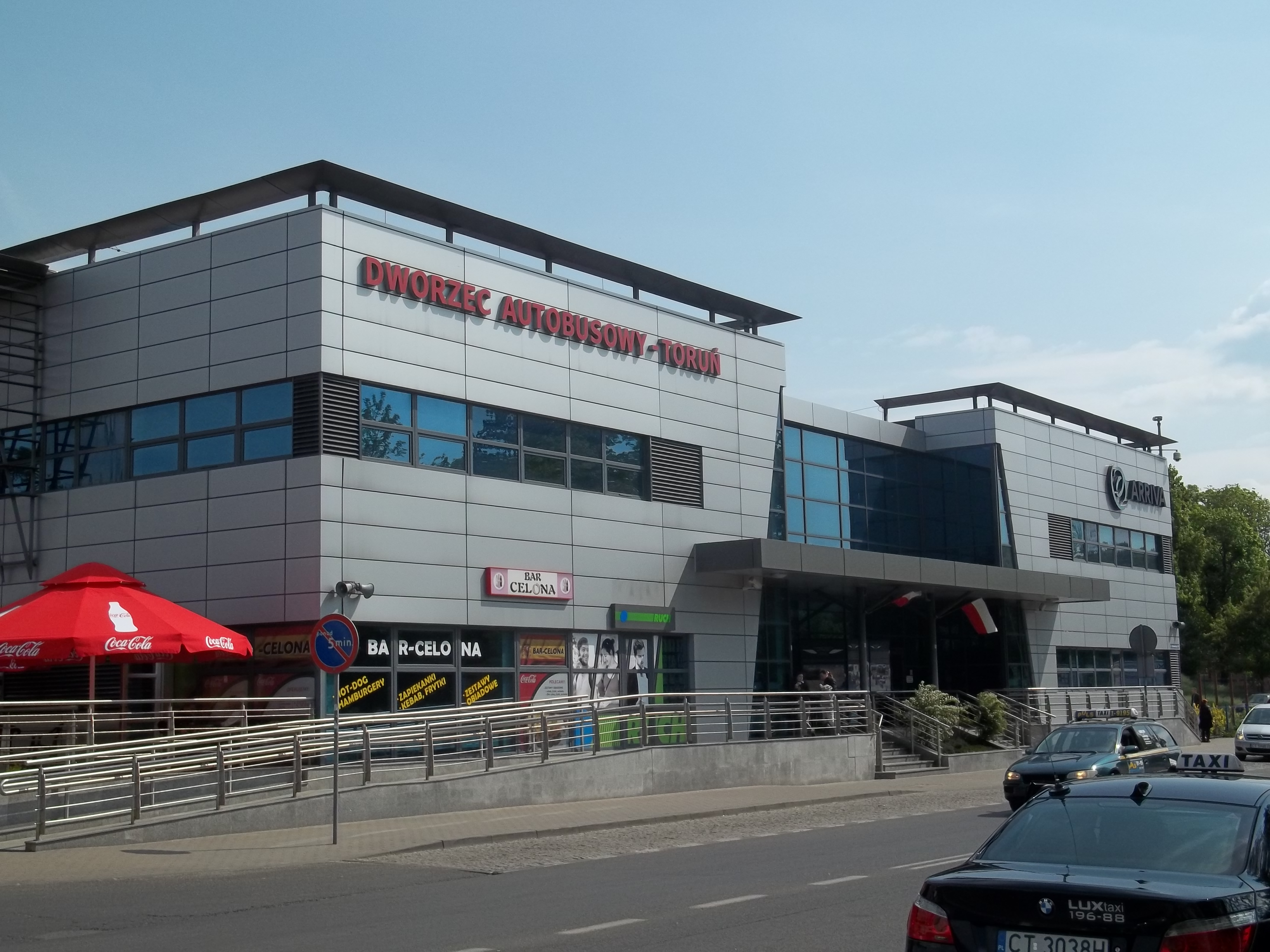 Dworzec Autobusowy w Toruniu